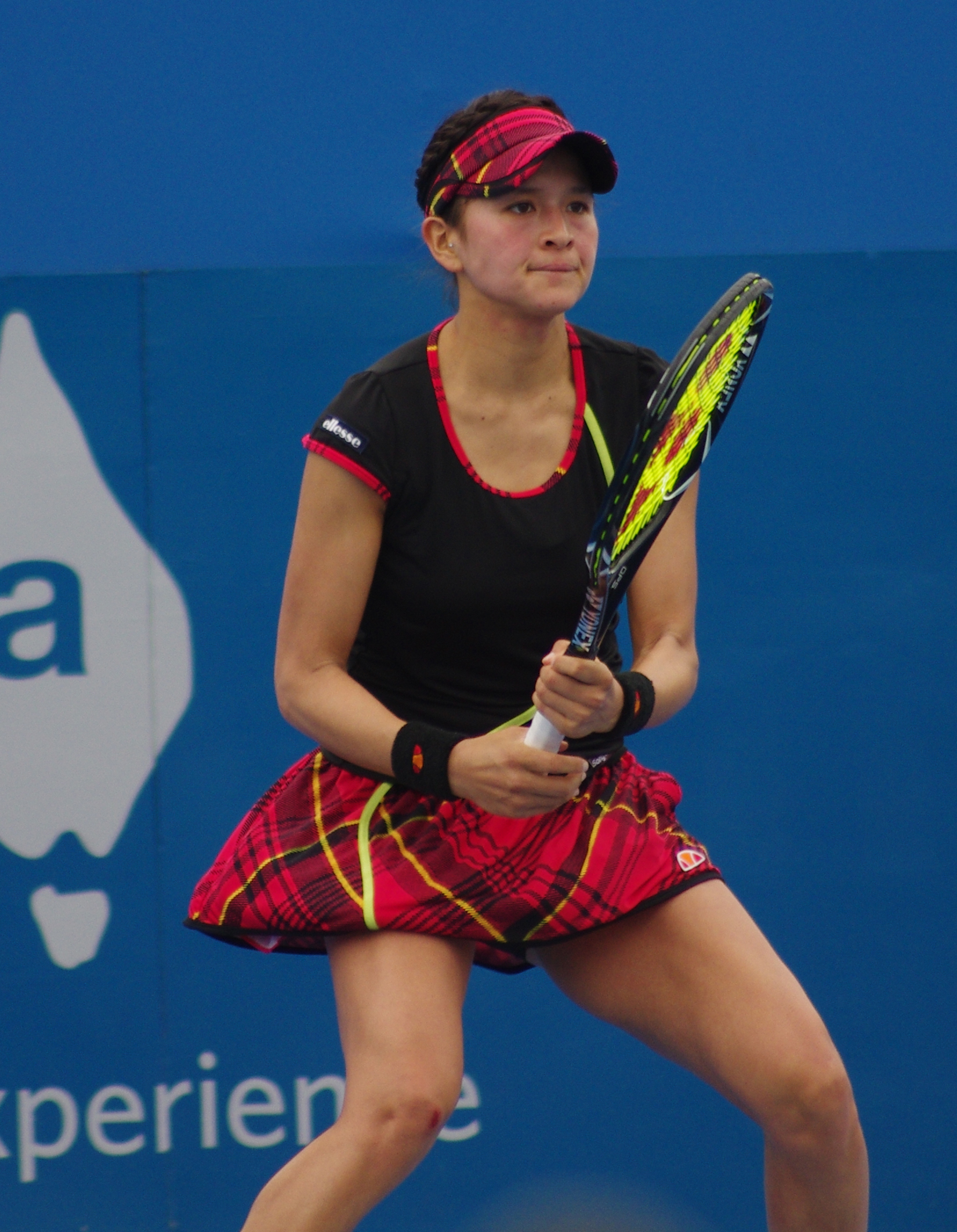 Erika sema